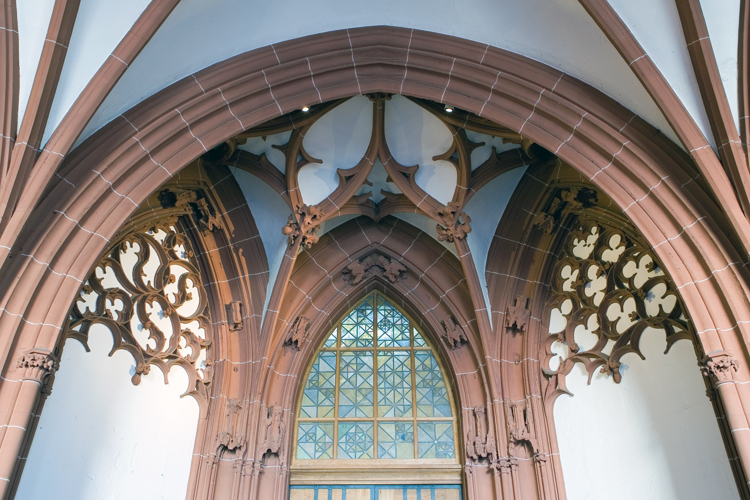 Spätgotisches Gewölbe (Madern Gerthener) im nördlichen Turmportal des Kaiserdoms St. Bartholomäus in Frankfurt am Main mit einem von Hans Leistikow gestalteten Fenster. Selber fotografiert im Februar 2008, Doppellizensierung GFDL & CC-BY-SA 2.5. Reshot version of the original Image:Mk Frankfurt Dom NördlichesTurmportal.jpg uploaded by User:Magadan.